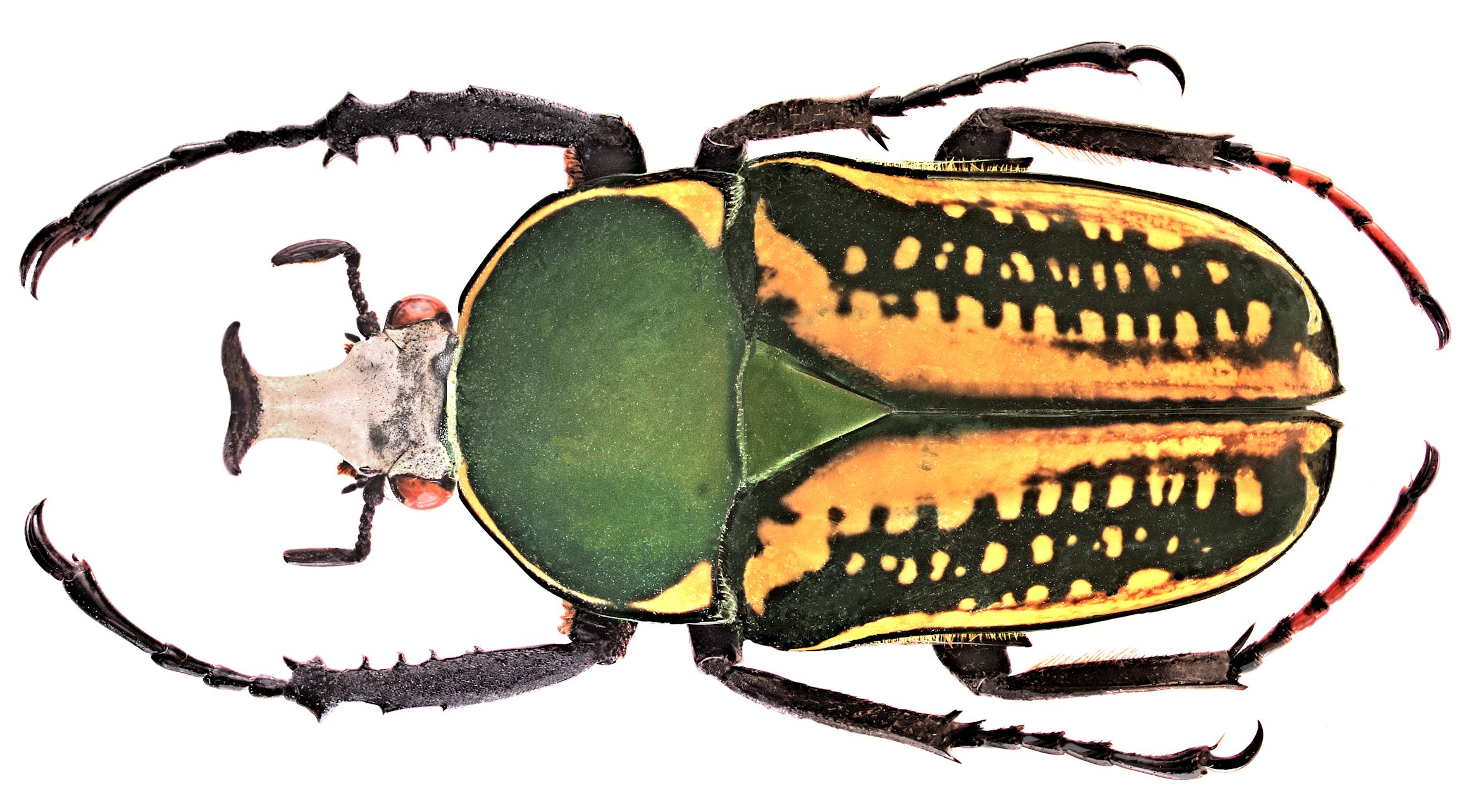 Familie: Scarabaeidae Grösse: 43 mm Verbreitung: Ost- und Zentralafrika Fundort: Kenia, Rondo, Kakamega-Regenwald leg. U.Eitschberger, 1997; det. U.Schmidt Foto: U.Schmidt, 2006